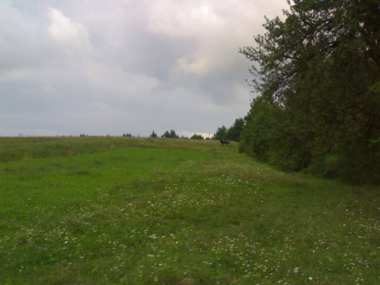 село Росохи, Україна, Львівська область, Старосамбірський район